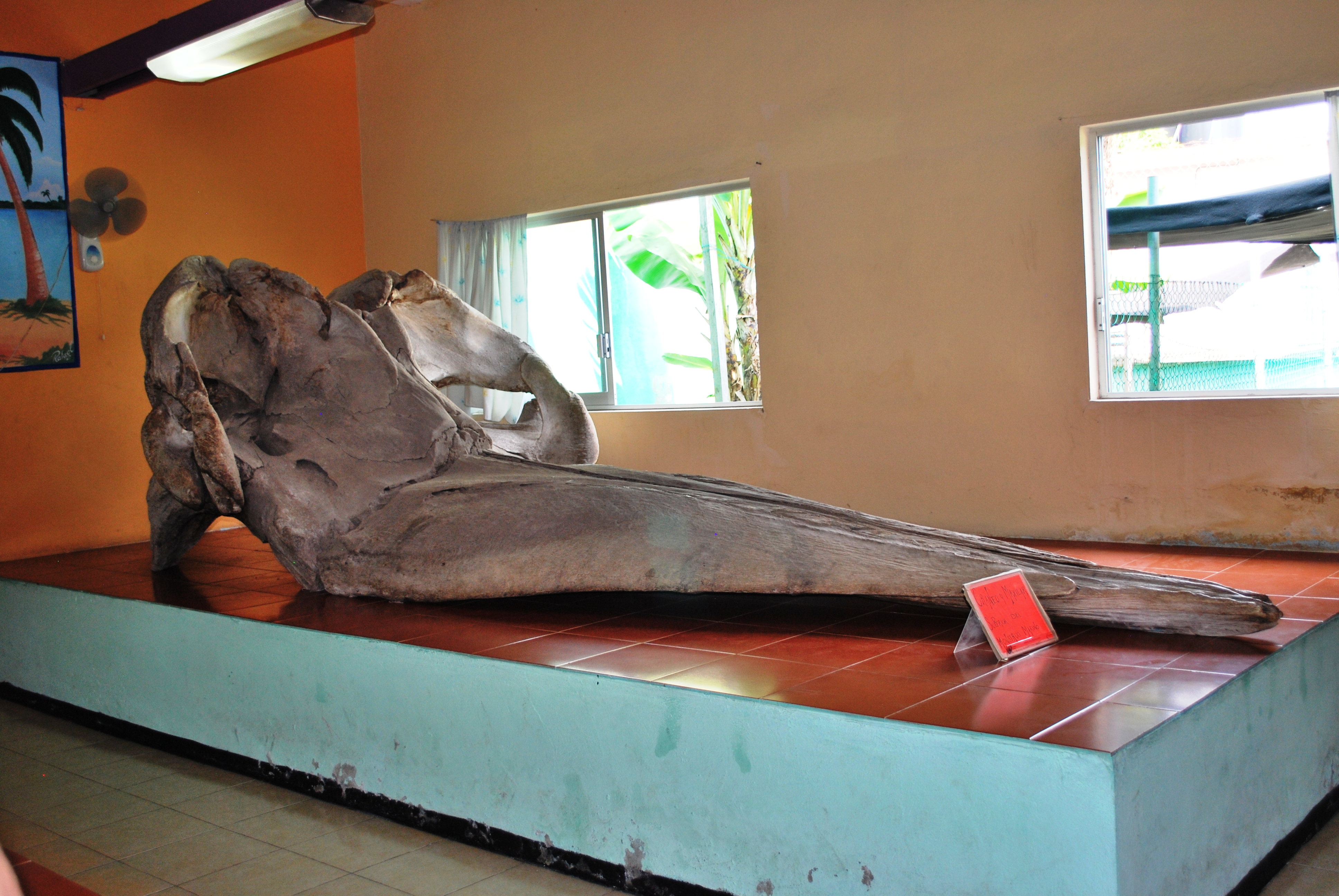 Skull of the "monster" at the marine museum in Tecolutla, Veracruz